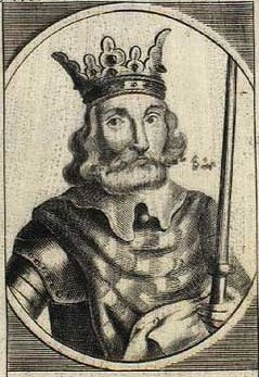 Svend 3. Grathe. Det Kongelige Bibliotek.